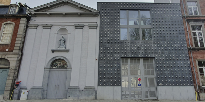 musée Namur Bateliers